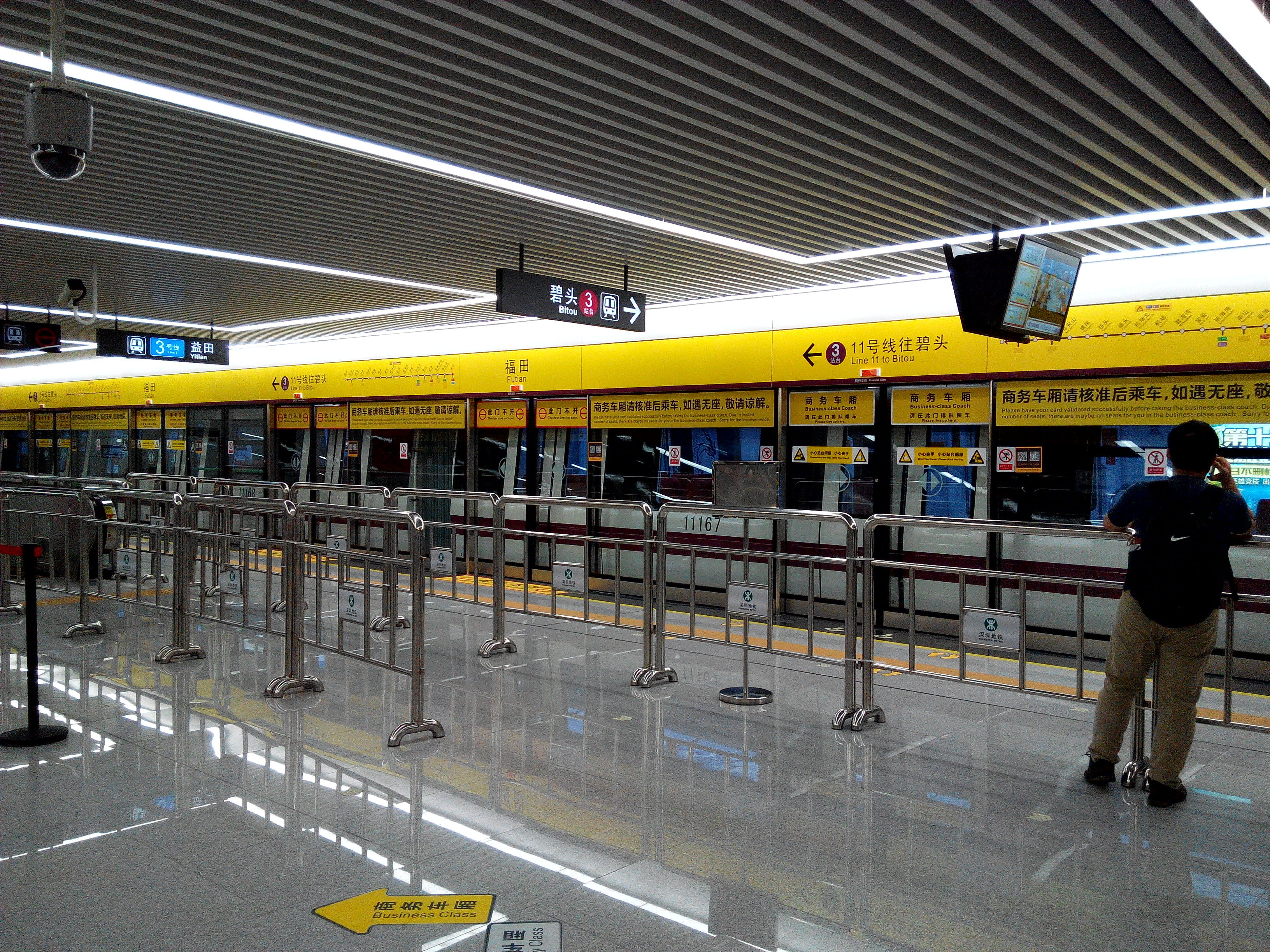 深圳地铁11号线福田站商务车厢站台部分